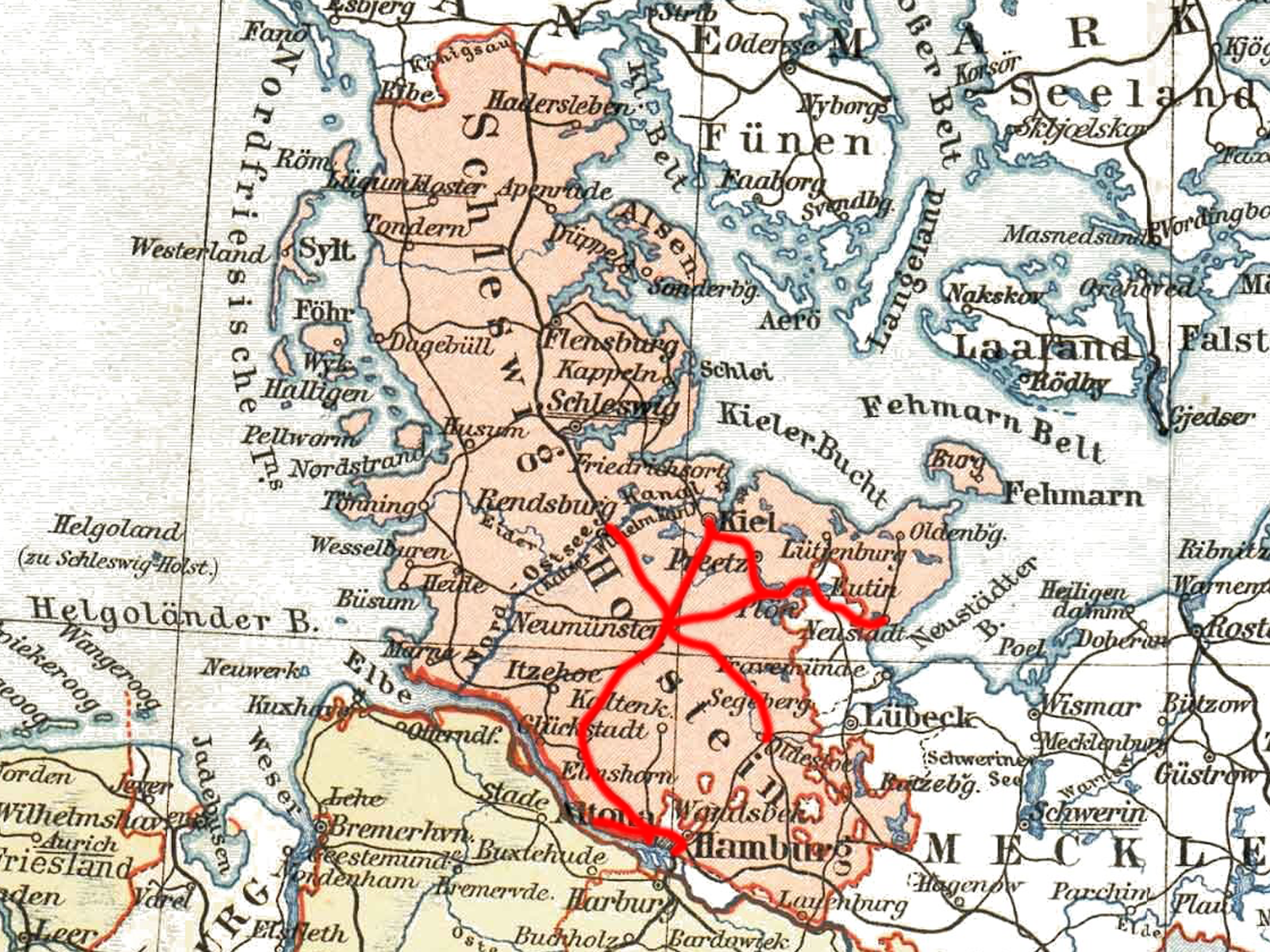 Streckennetz der Altona-Kieler Eisenbahn-Gesellschaft (AKE) 1905